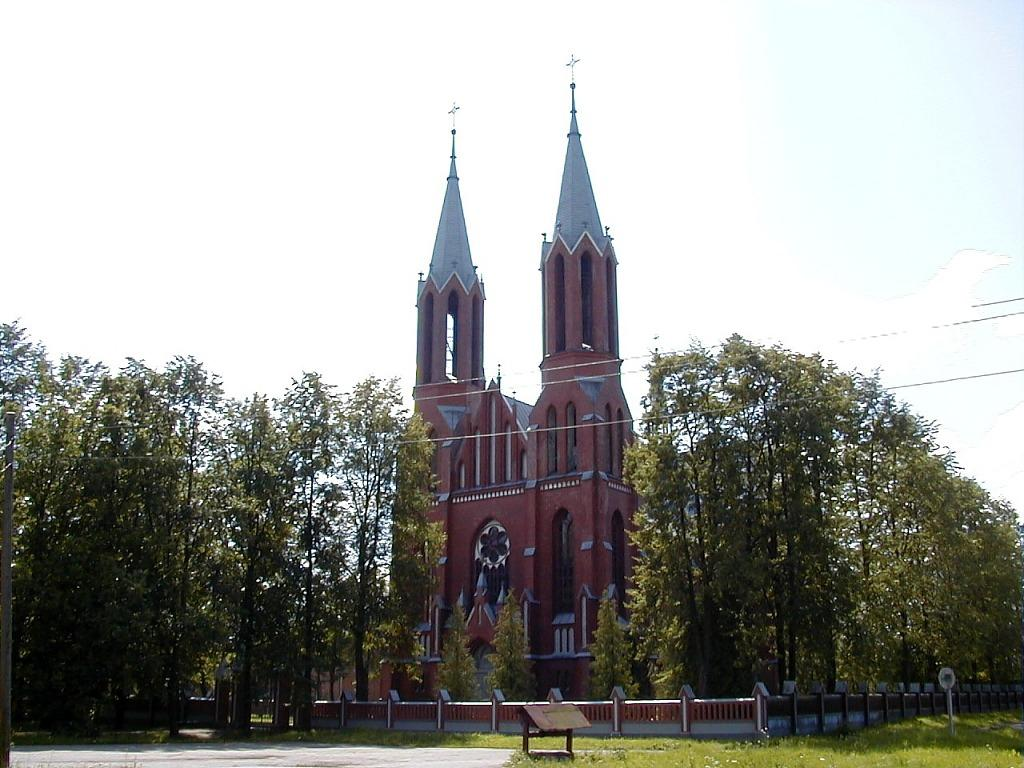 Liksna - rzymskokatolicki kościół parafialny p.w. Najświętszego Serca Pana Jezusa Līksna (Leiksna) Sacred Heart of Jesus Roman Catholic Church, Daugavpils municipality, Latvia.